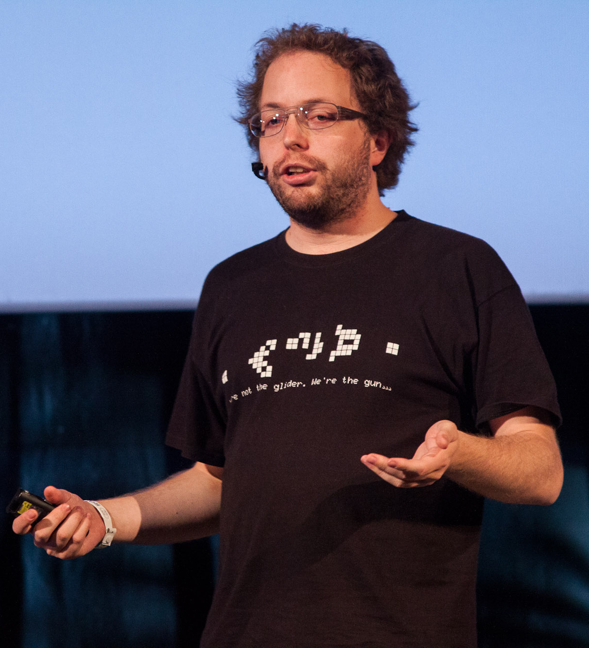 Smári McCarthy 2012 in Belgrad